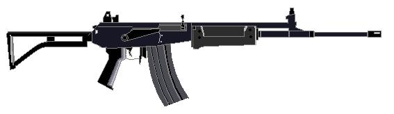 my own work